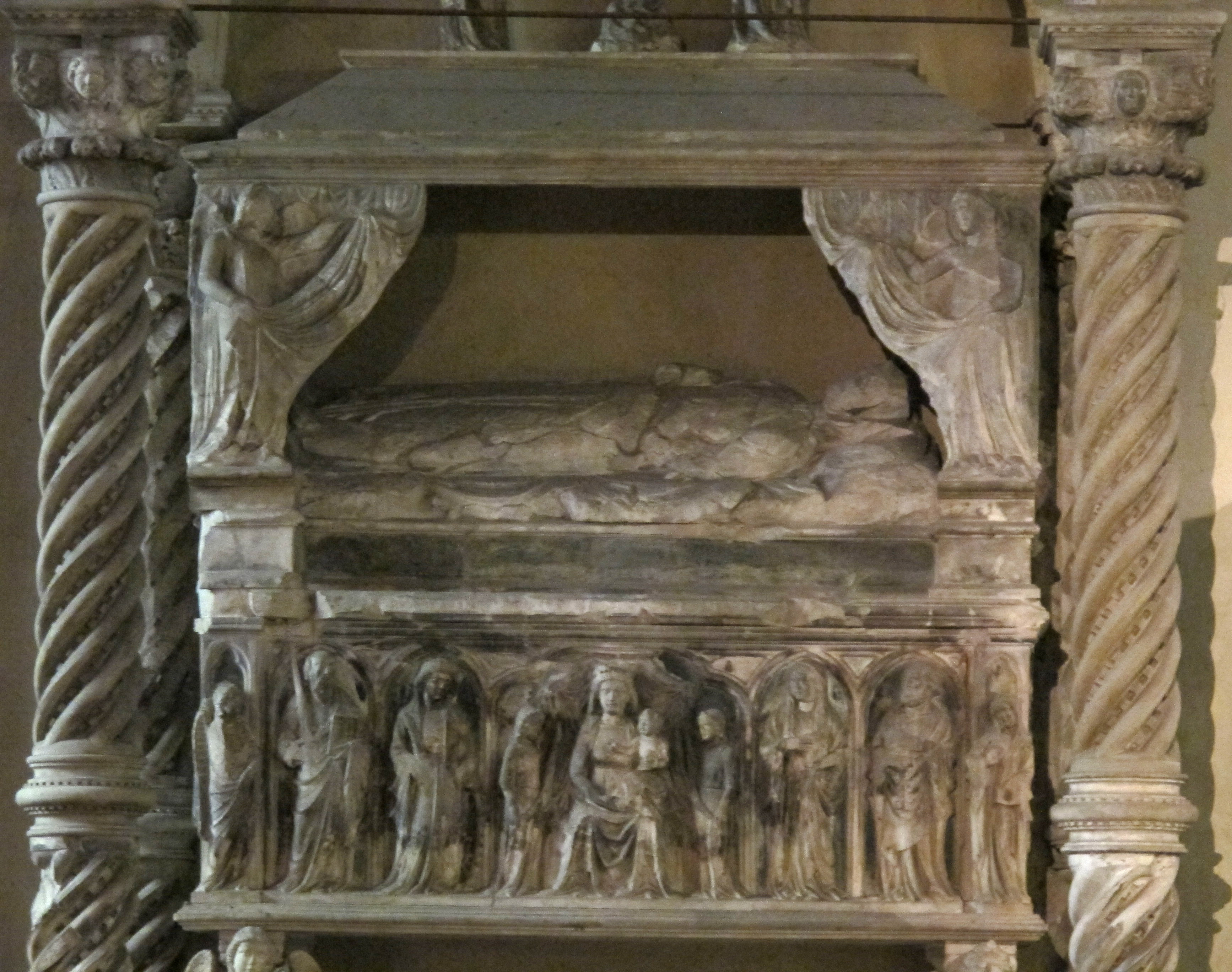 Santa Chiara (Napoli)